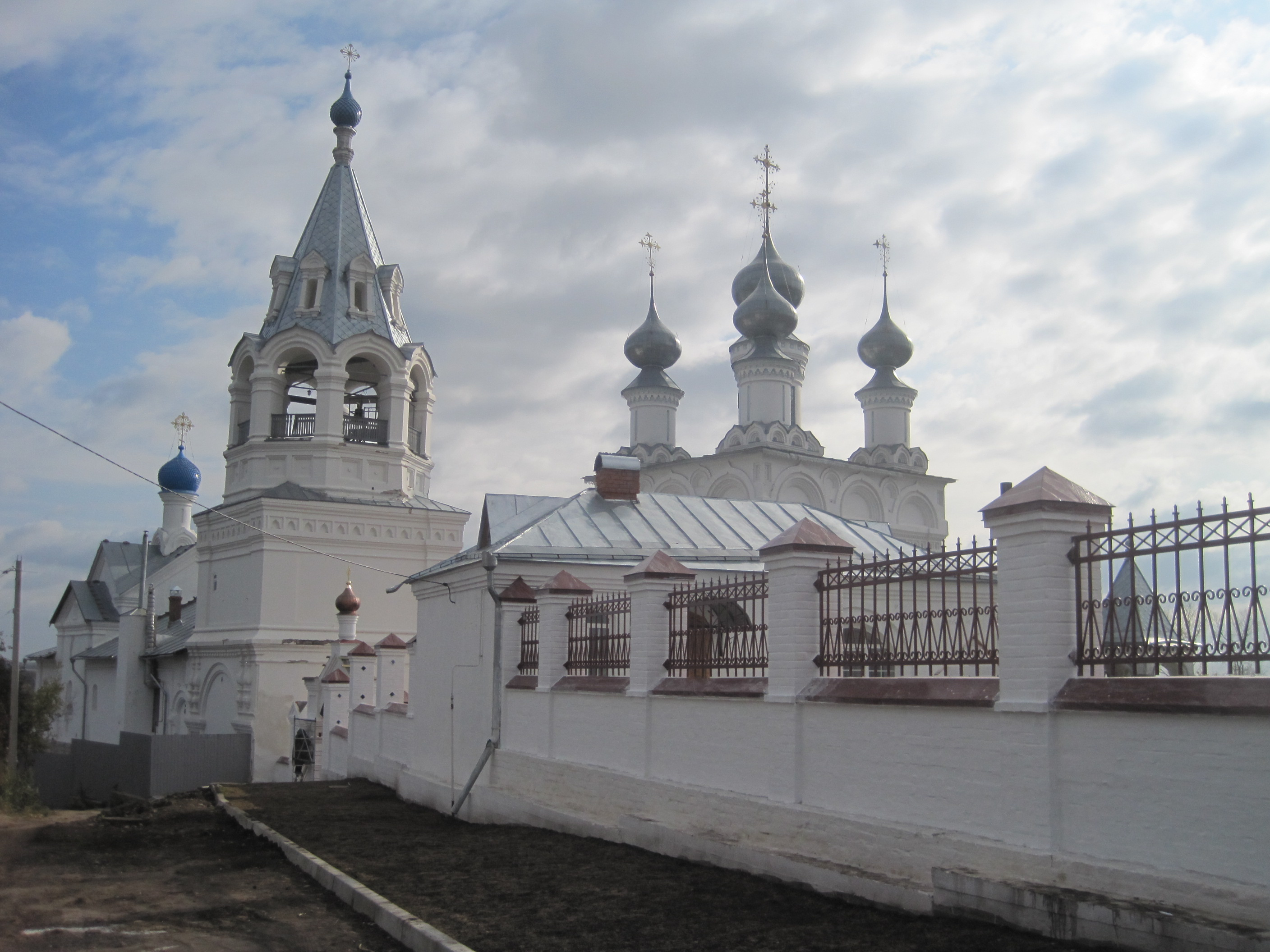 Mur d'enceinte du couvent de la Resurrection de Mourom